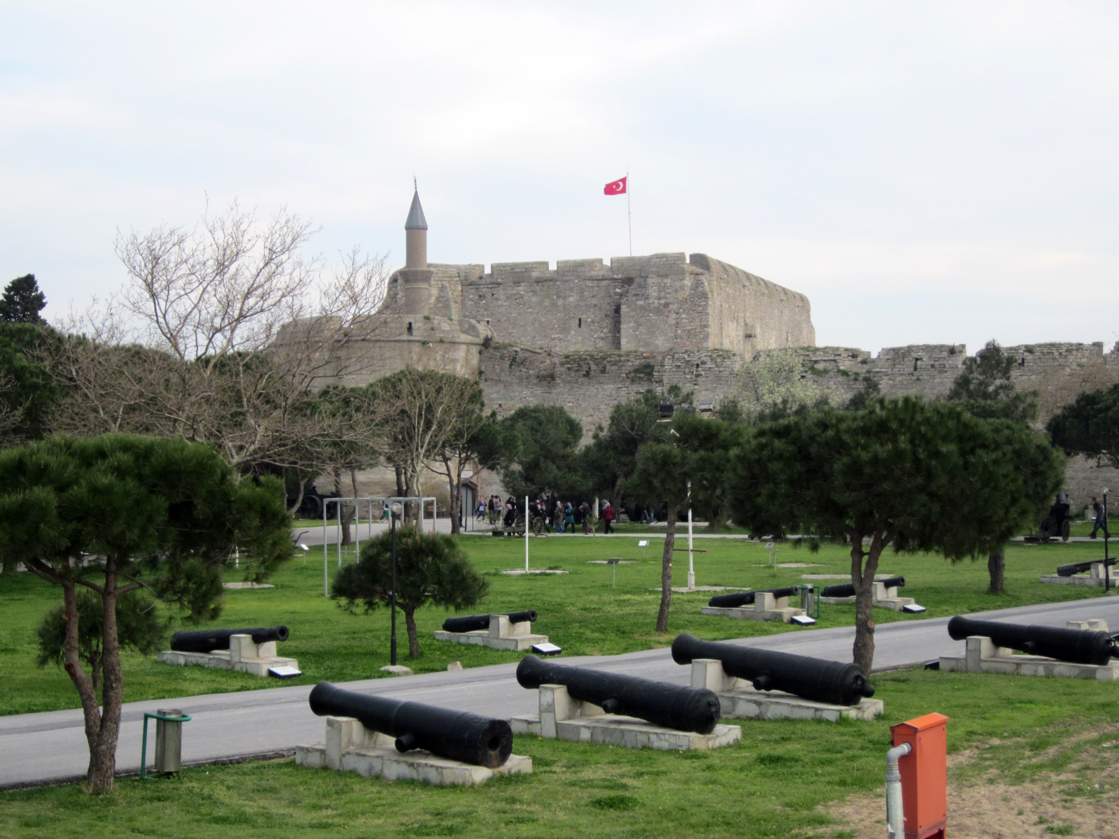 Çanakkale, Turkey. Cimenlik Castle, now military museum